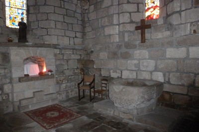 Les fonds baptismaux - Eglise St Léger de Bessines-sur-Gartempe